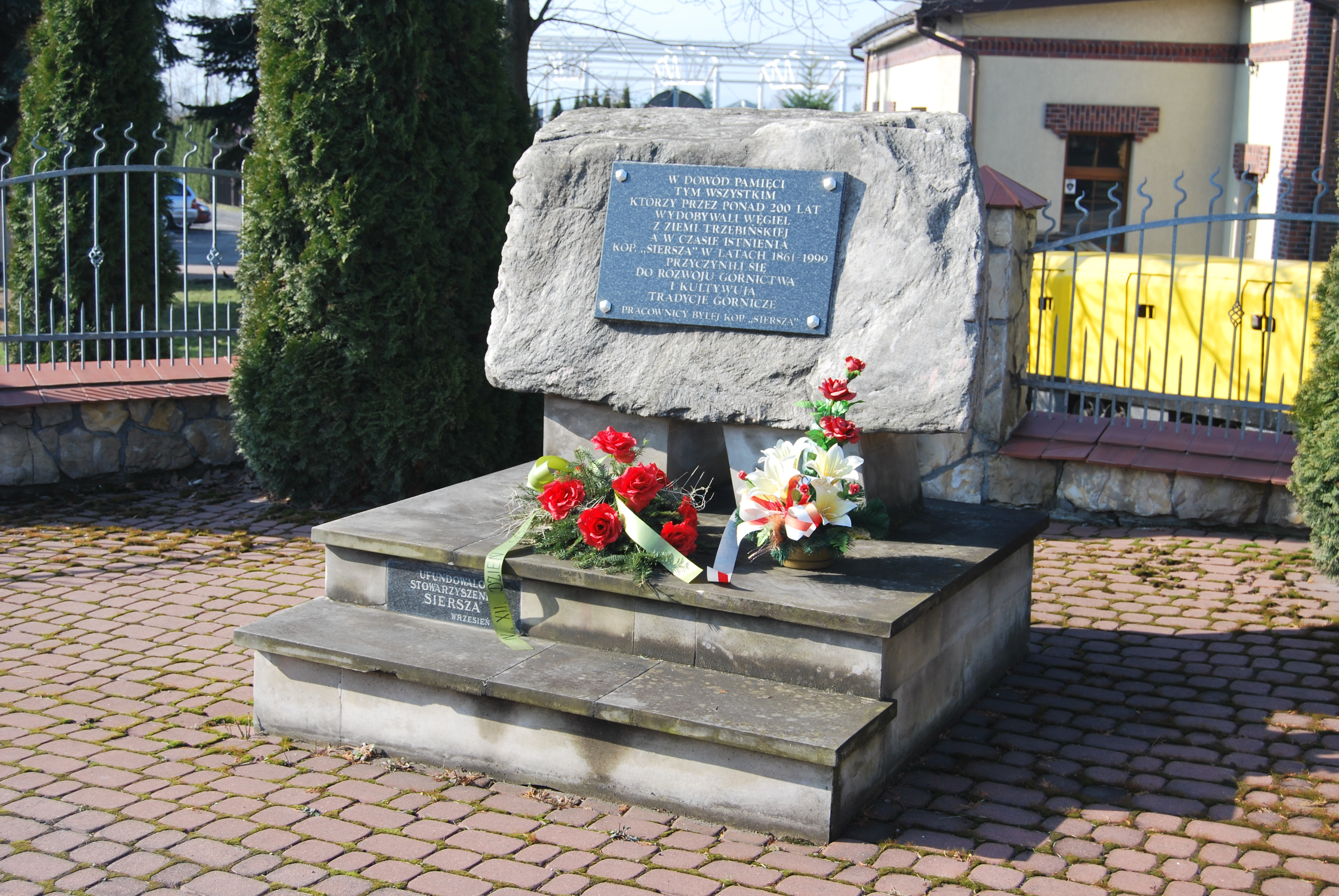 Tablica poświęcona pracownikom Kopalni "Siersza" przed budynkiem Muzeum Regionalnego w Trzebini (2015).